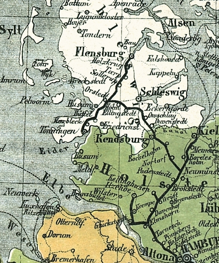 Ausschnitt Daenische Bahnen in Schleswigholstein aus der Bahnkarte_Deutschland_1861